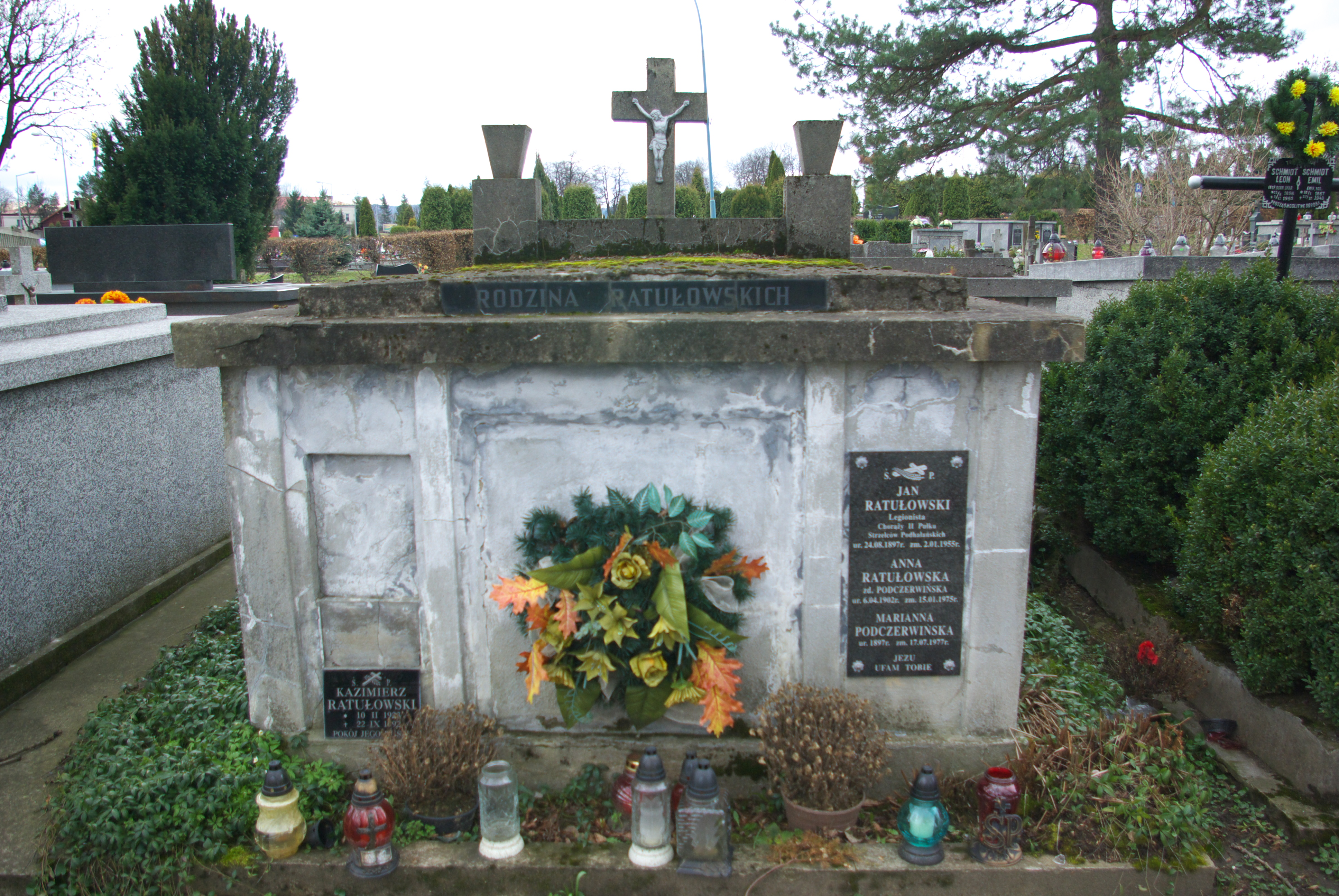 Grobowiec rodziny Ratułowskich w części „Matejki Stary” Cmentarza Centralnego w Sanoku